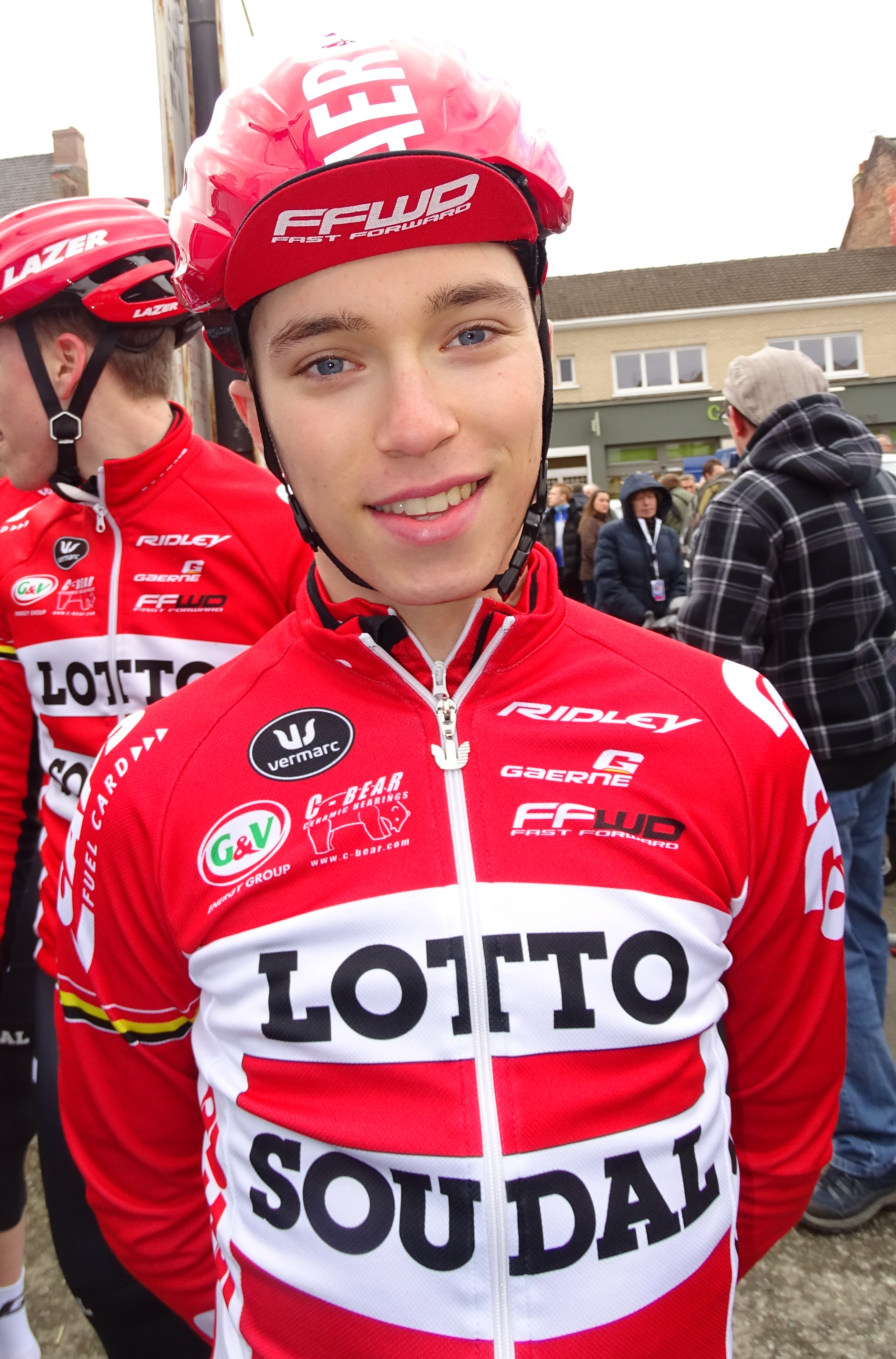 Reportage réalisé le dimanche 6 mars à l'occasion du départ et de l'arrivée du Grand Prix de Lillers-Souvenir Bruno Comini 2016 à Lillers, Pas-de-Calais, Nord-Pas-de-Calais, France.